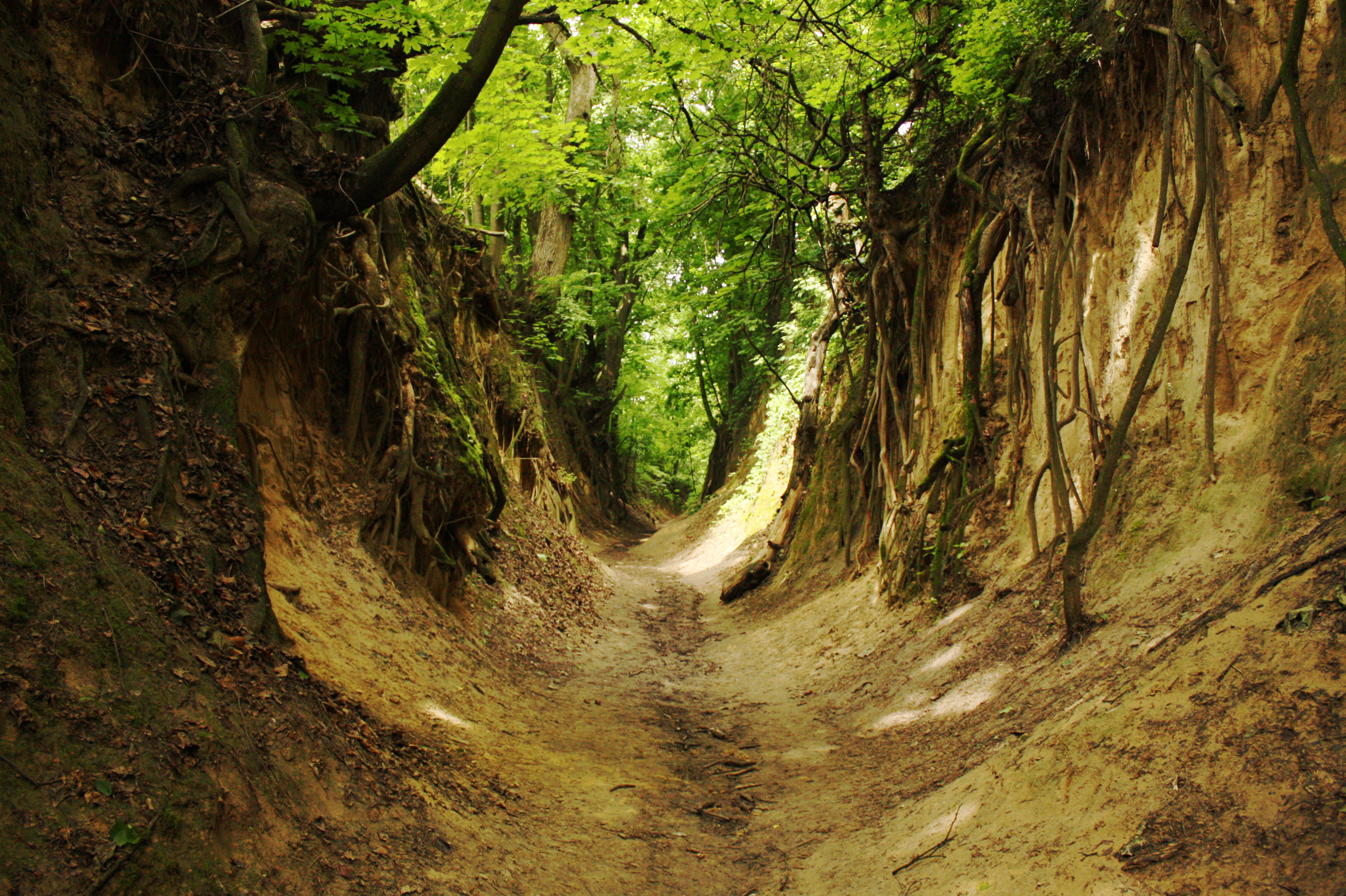 Wąwóz Świętej Królowej Jadwigi w Sandomierzu